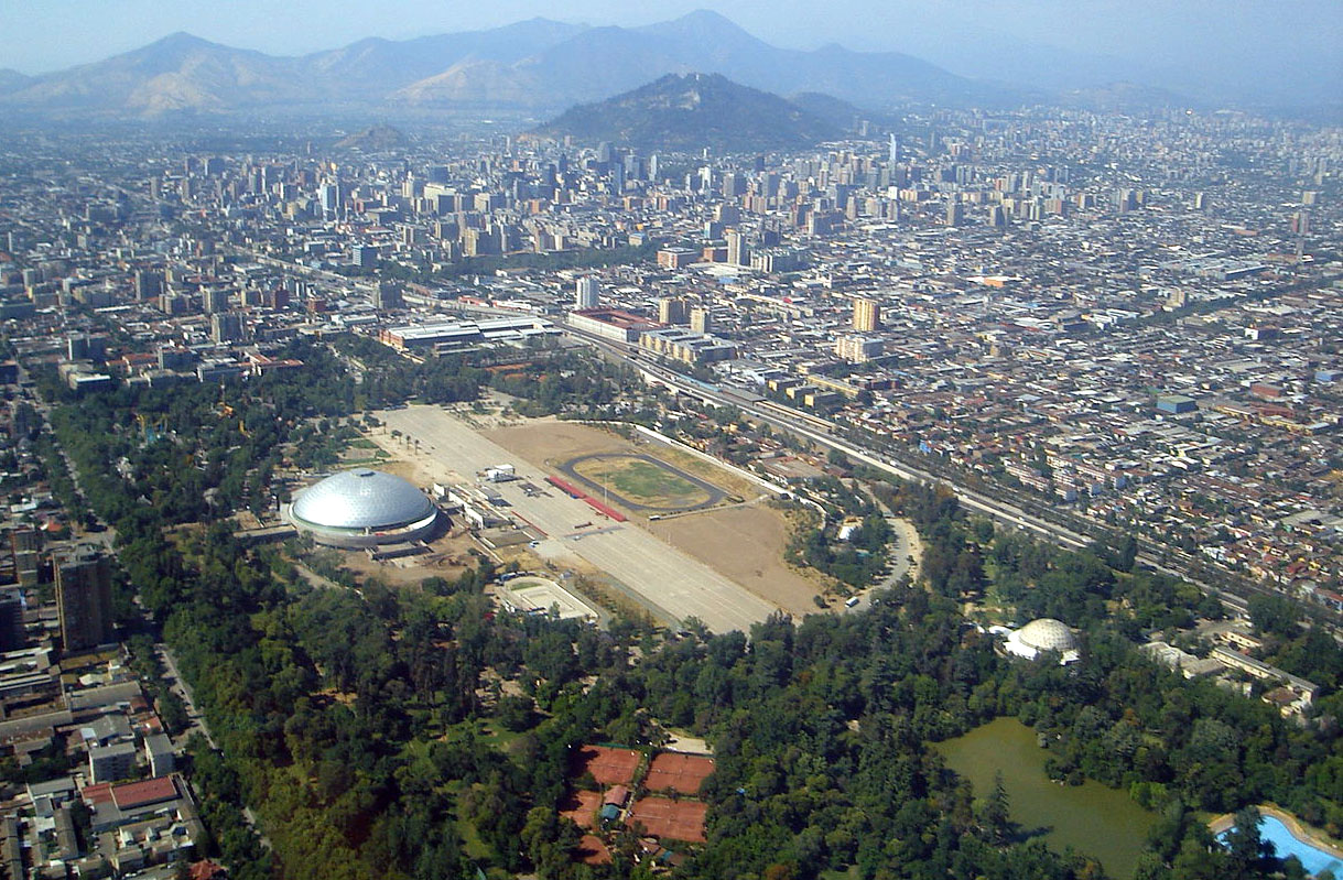 Ciudad de Santiago, toma áerea